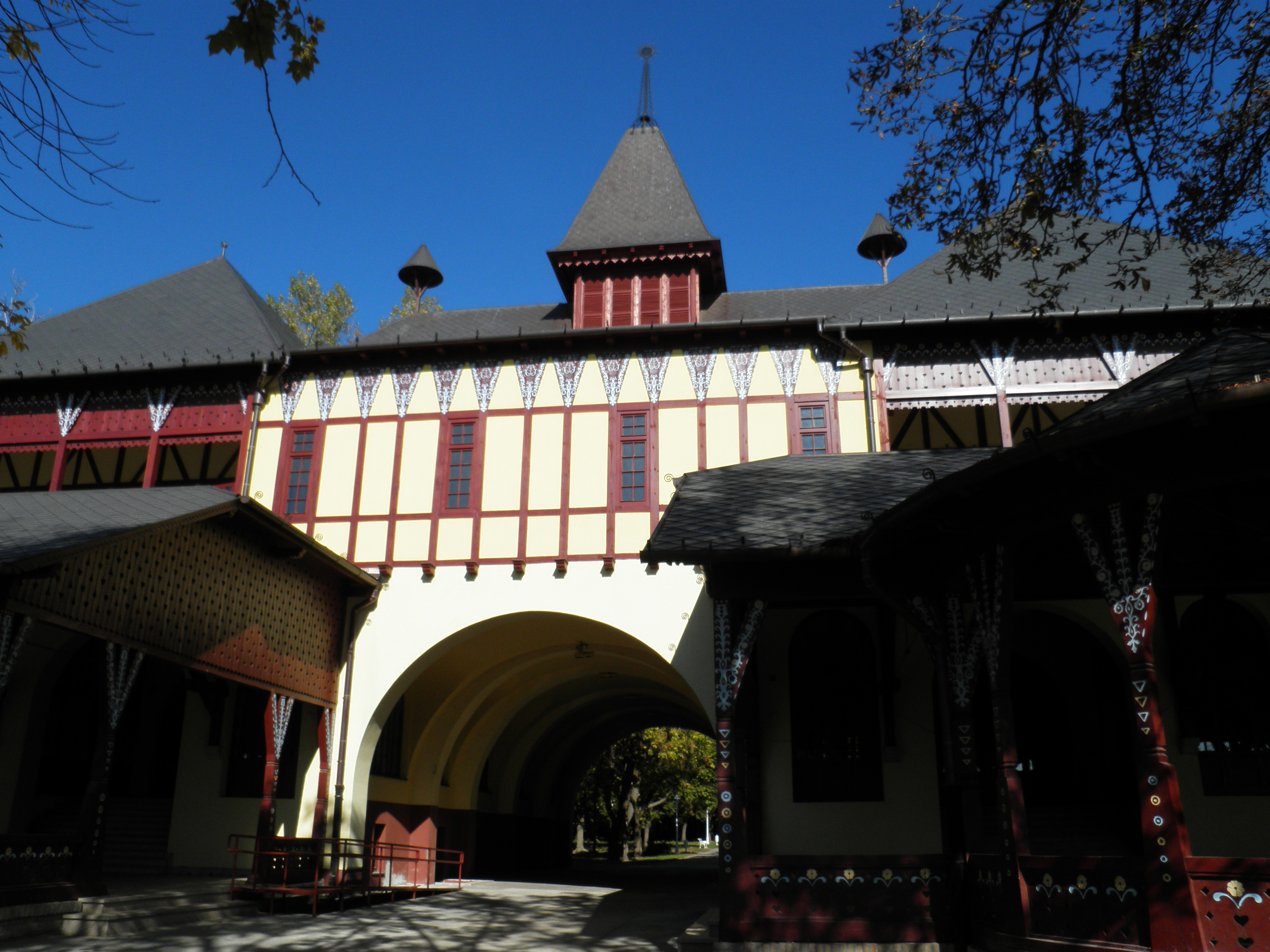 Palićko jezero